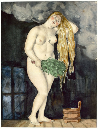 Из серии "Русские типы". 1921 Бумага, акварель, карандаш графитный.